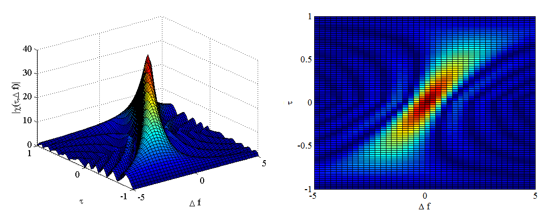 Функция неопределенности ЛЧМ импульса